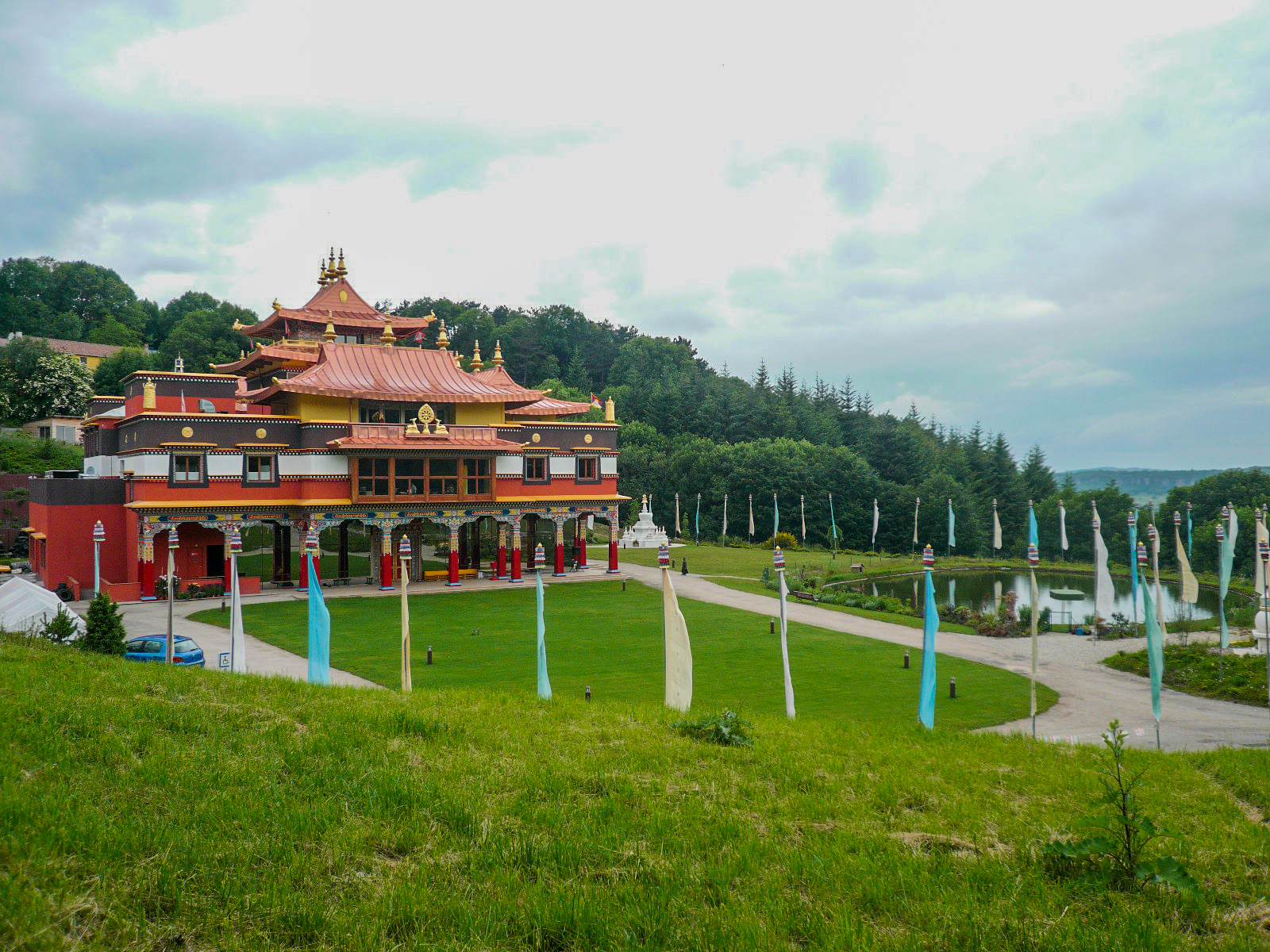 Temple bouddhiste Lerab Ling et la vallée